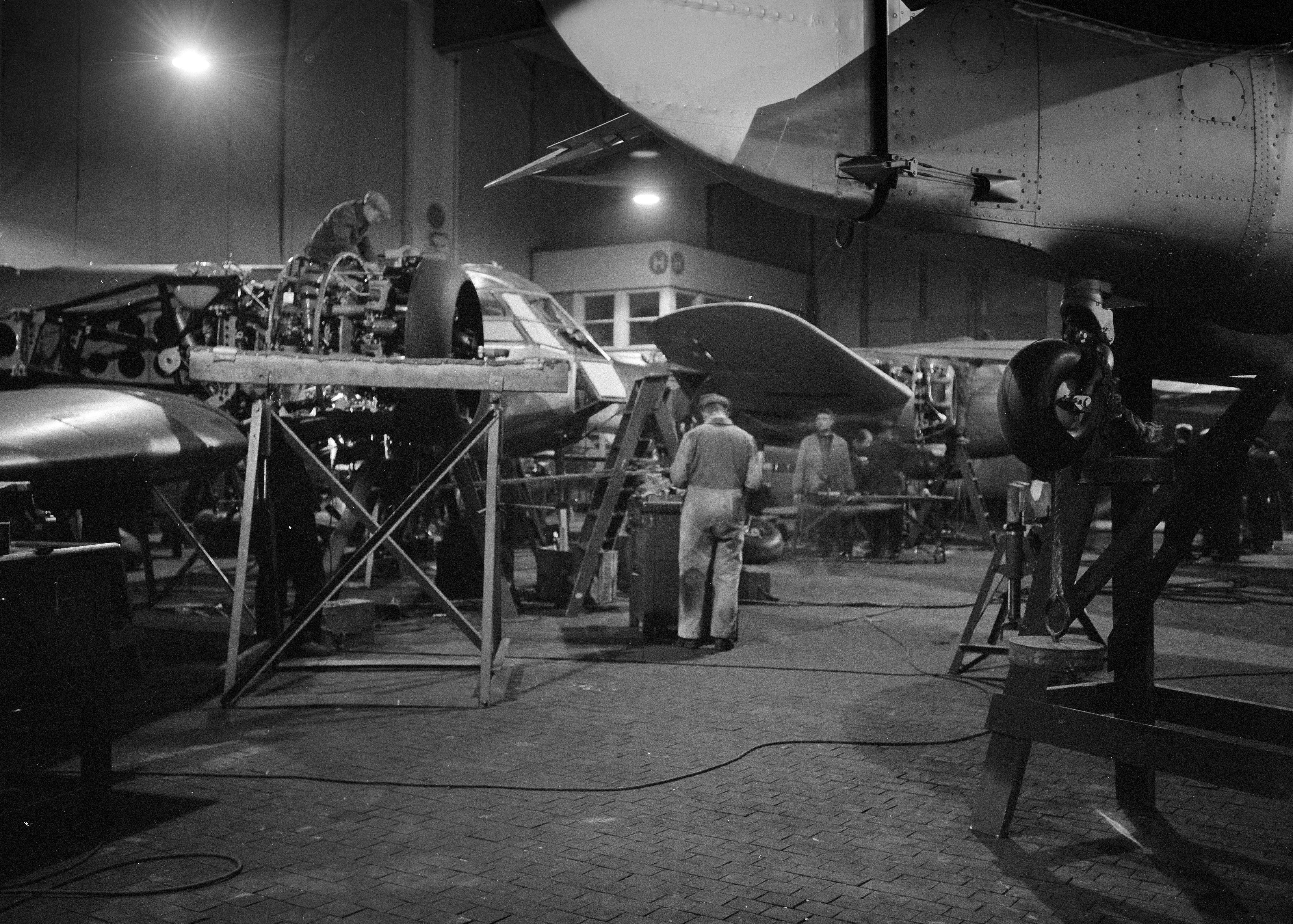 Yleiskuvia työhalleista. Kuvauspaikka: Tampere, Valtion lentokonetehdas